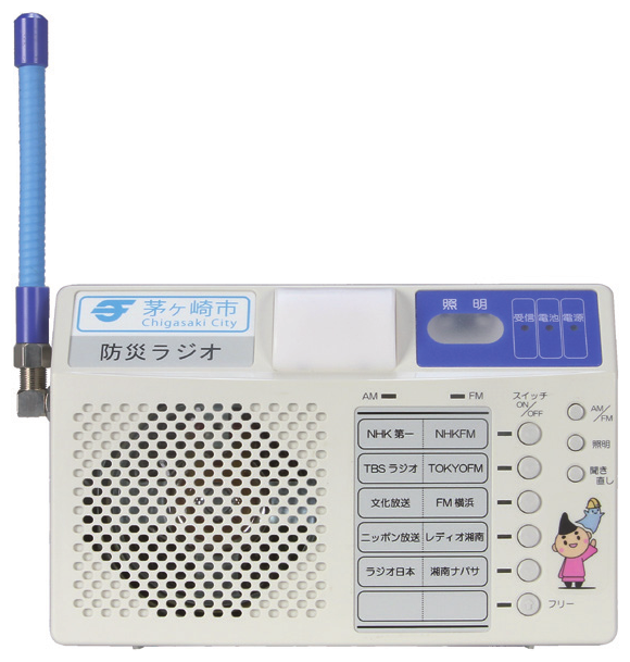 神奈川県茅ケ崎市の防災ラジオ、東京テレメッセージ TTR11A（URO電子工業製）。